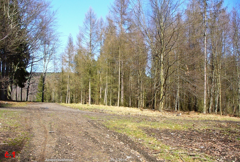 Fotografie č.1